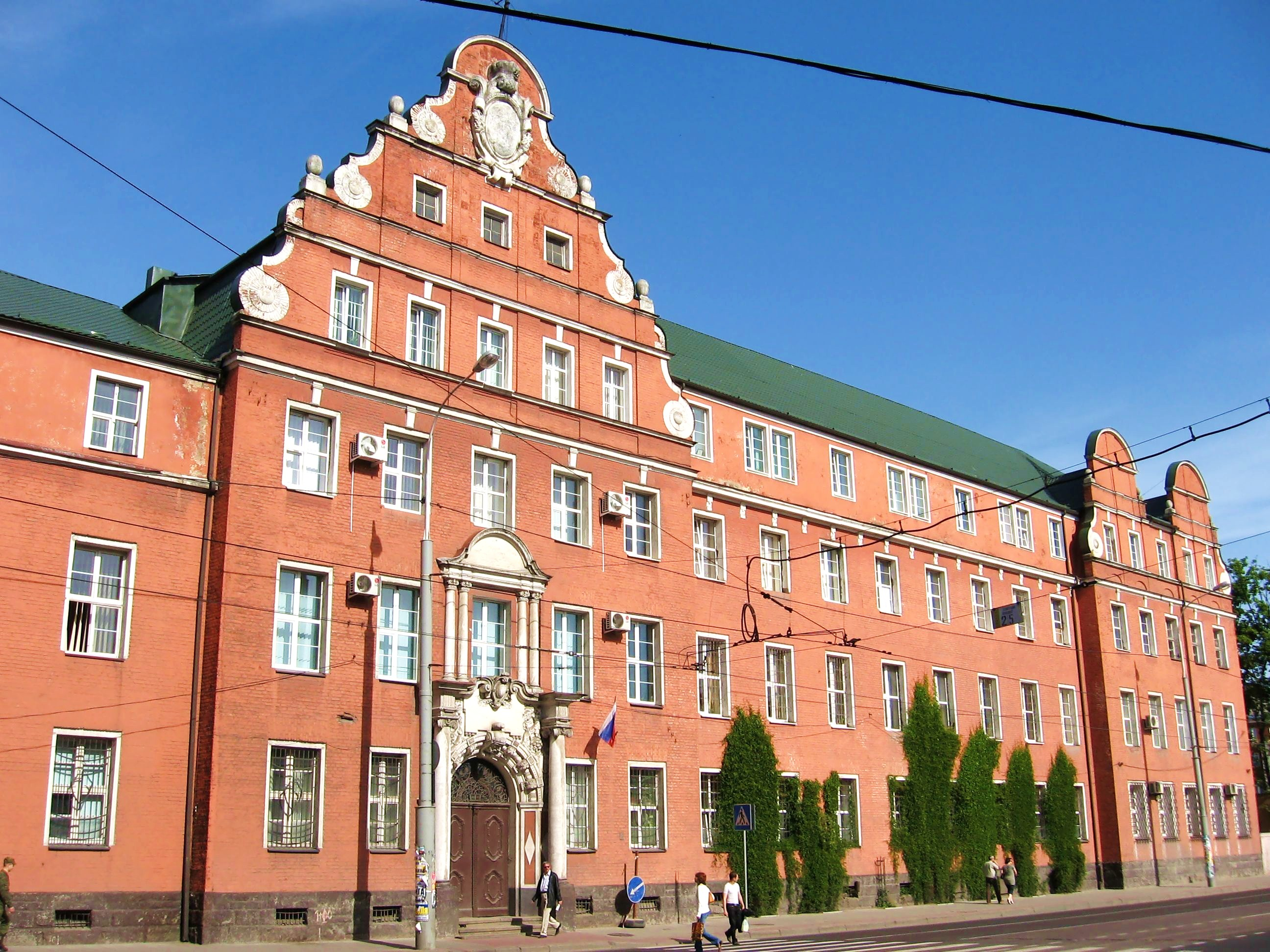 Здание полицайпрезидиума с рельефами на портале главного входа (Калиниградская область, Калининград, советский пр., 3-5)